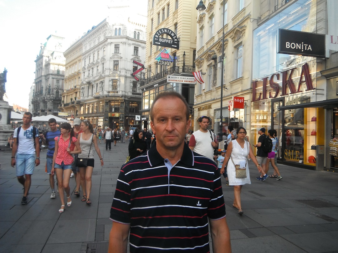 Dragan Djokanovic in Wien, Österreich